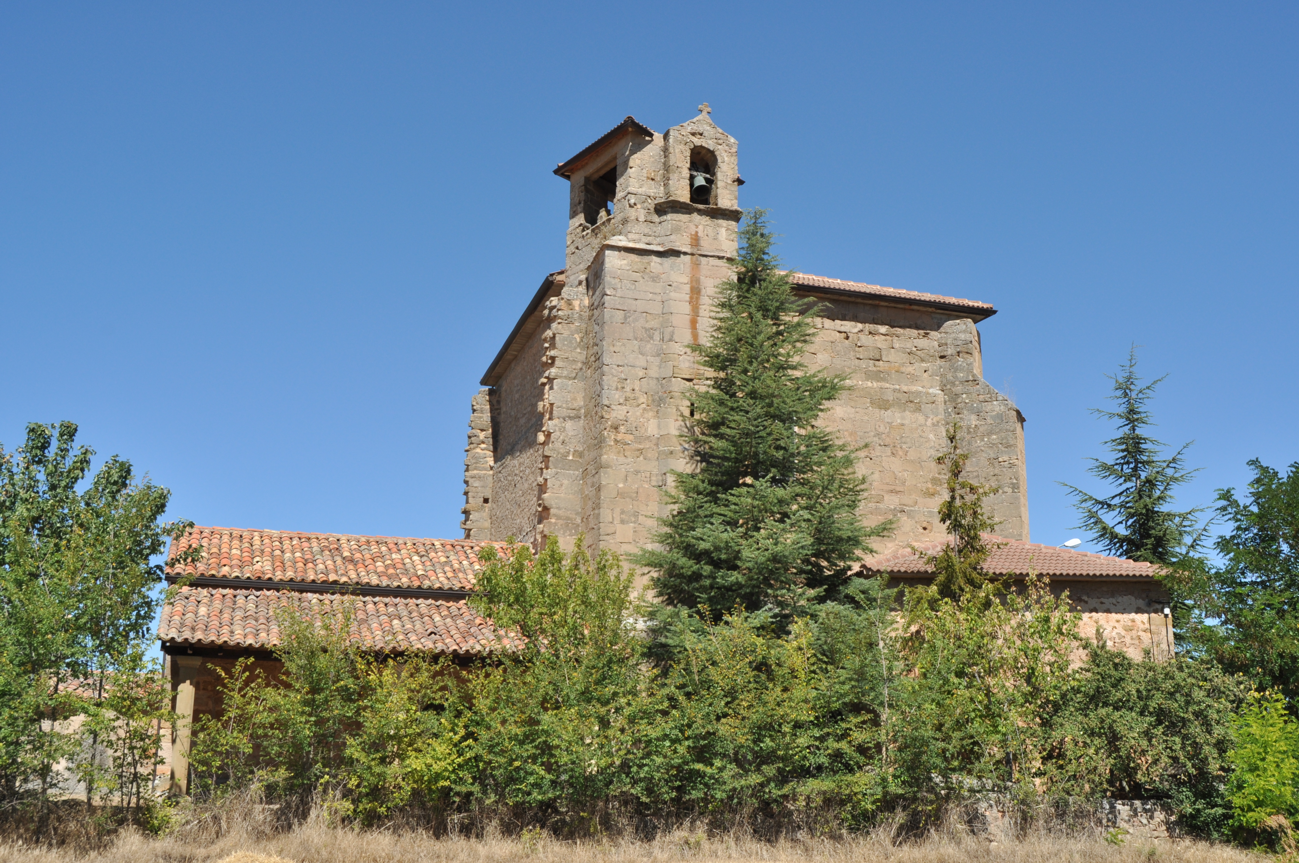 Piernigas - 001